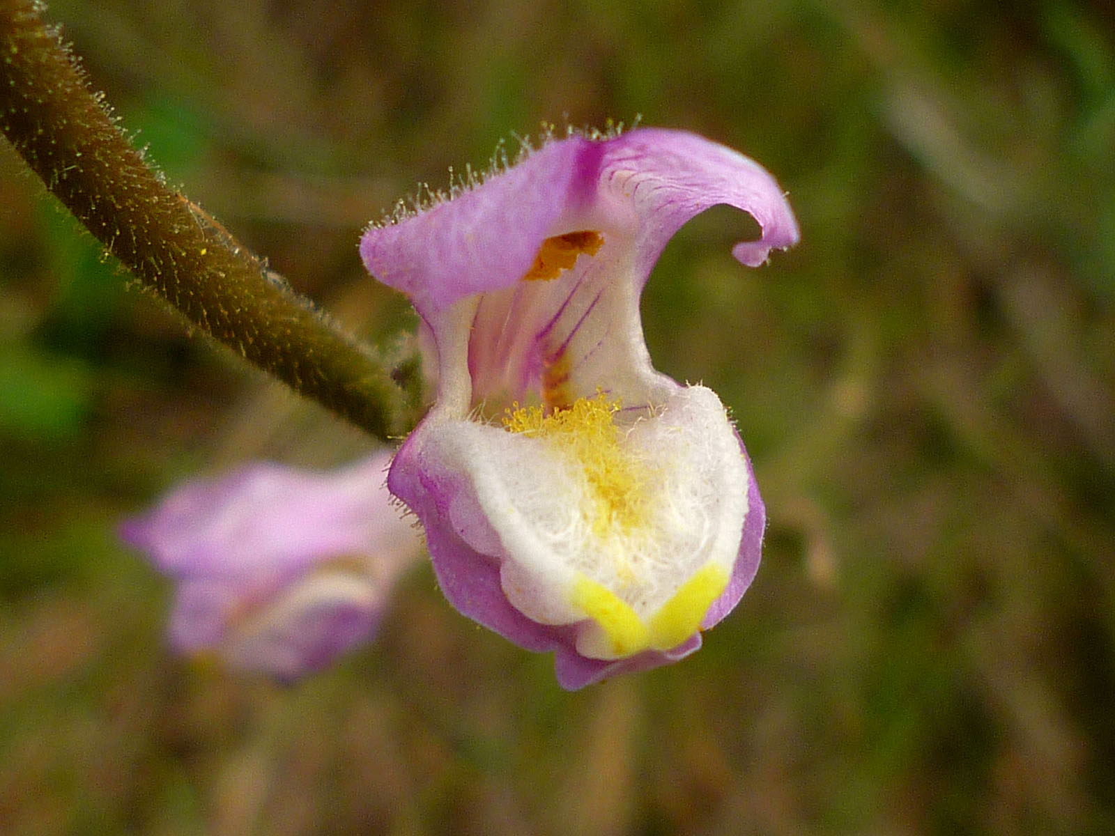 Antirrhinum barrelieri en la Sierra de la Muela, Cartagena, España.